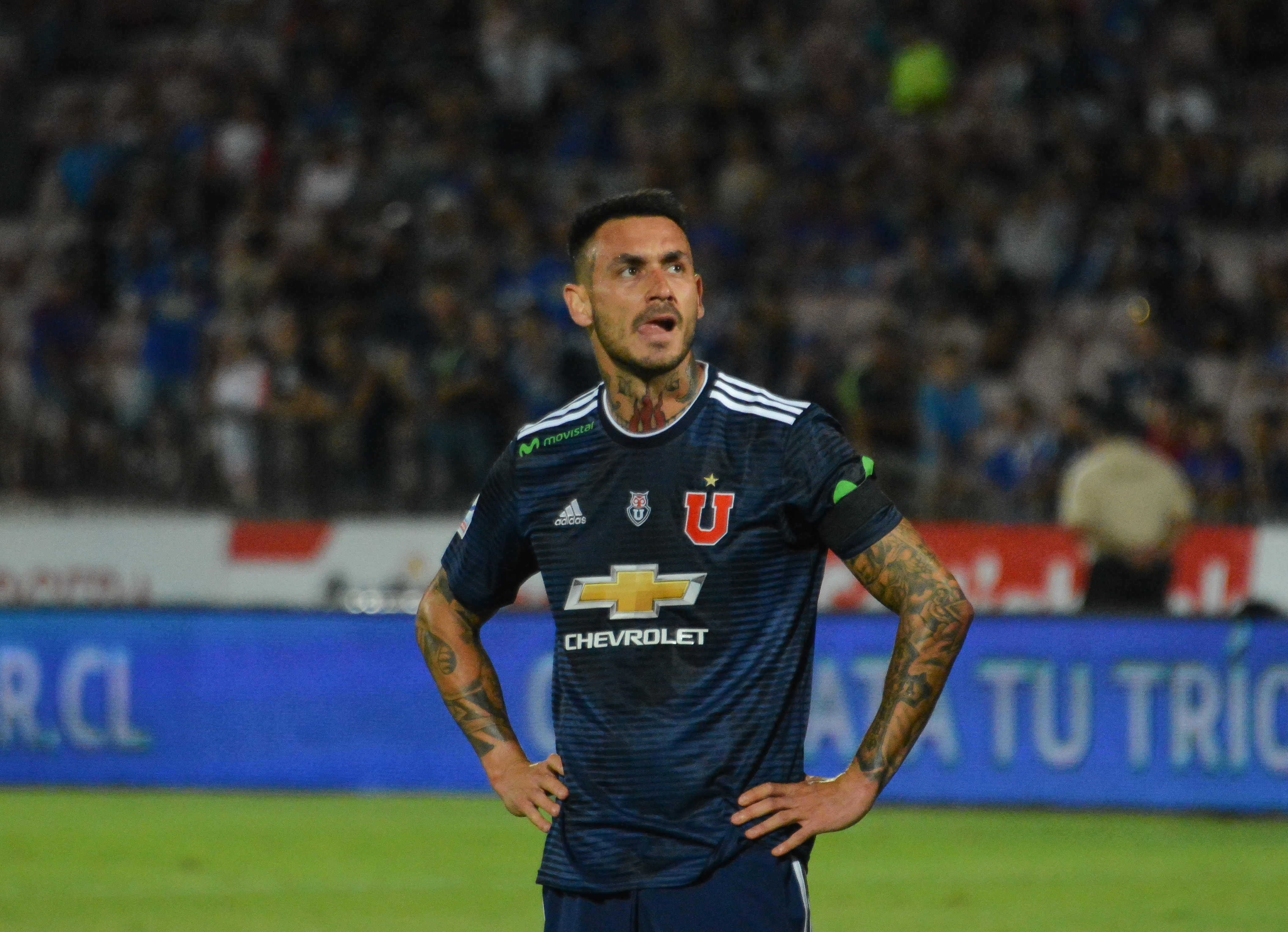 Mauricio Pinilla, Universidad de Chile v Deportes Antofagasta, Estadio Nacional, Santiago, Chile.